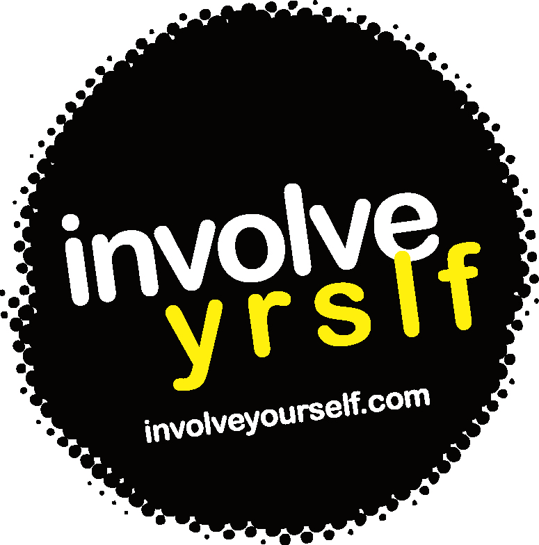 Logo for felleskampanjen Involve_Yourself